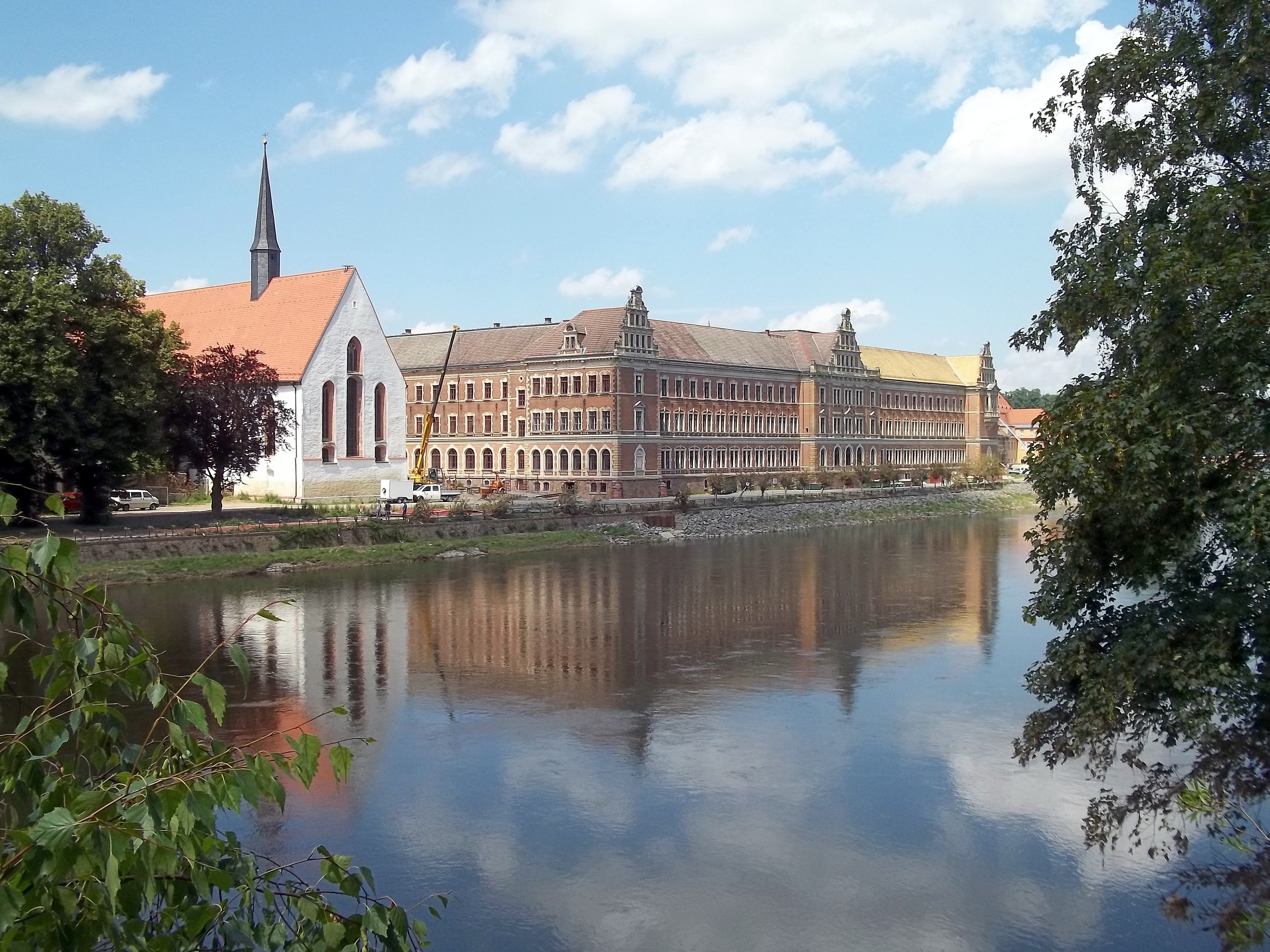 Klosterkirche Grimma und Gymnasium St. Augustin - Foto: Holger Zürch